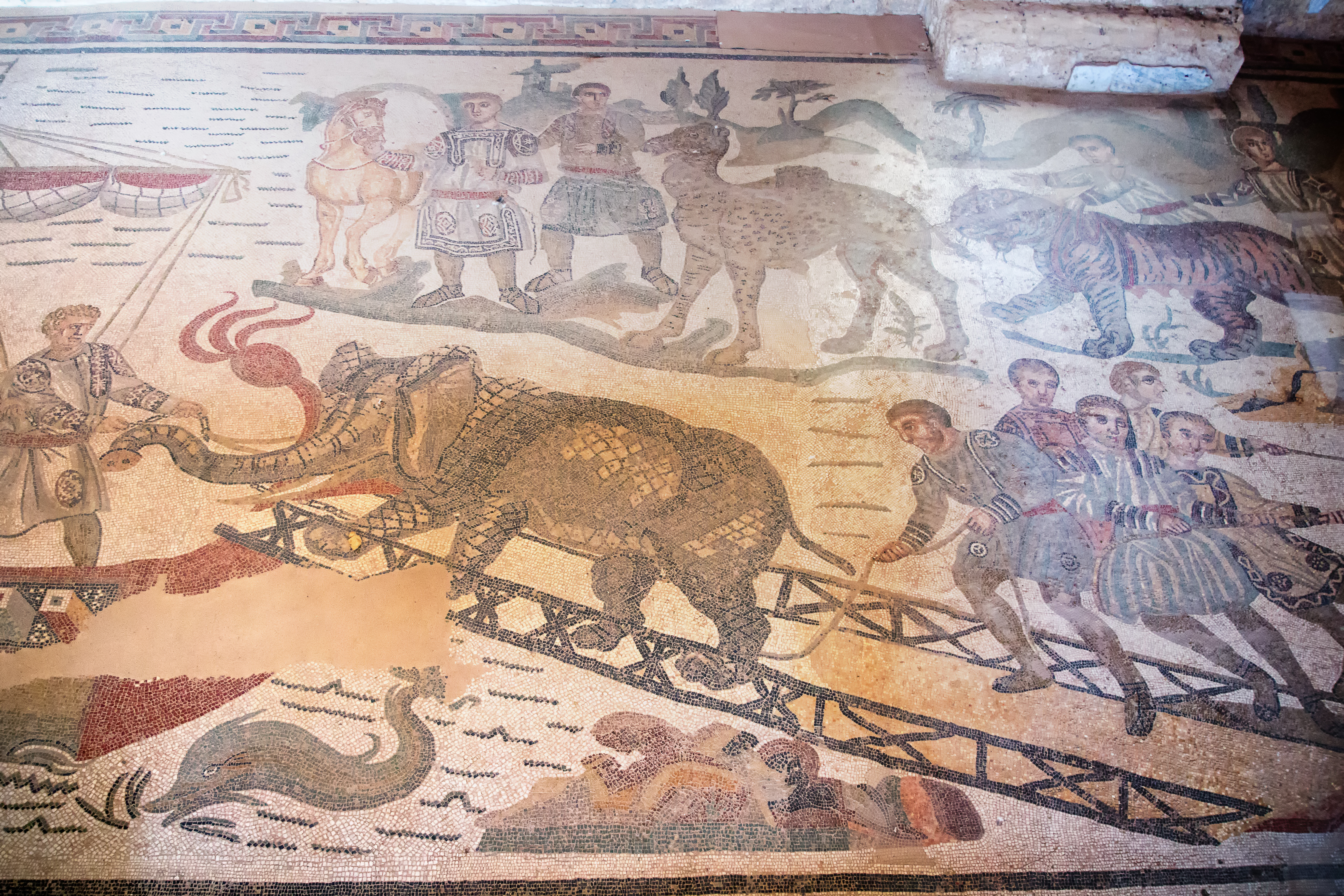 Villa Romana del Casale